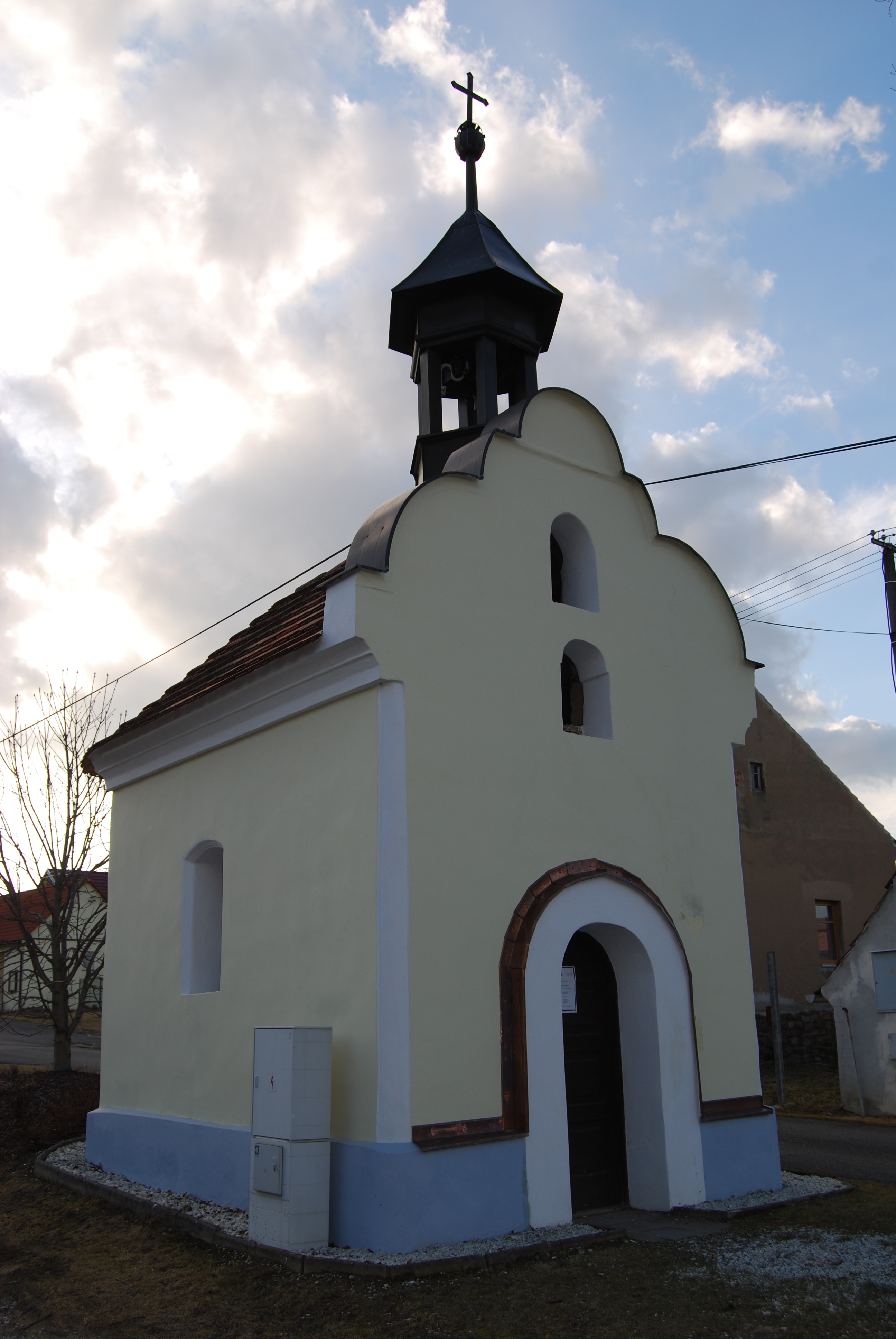 Návesní kaple (pohled zpředu). Brusy je malá vesnice, část obce Přešťovice v okrese Strakonice. Česká republika.